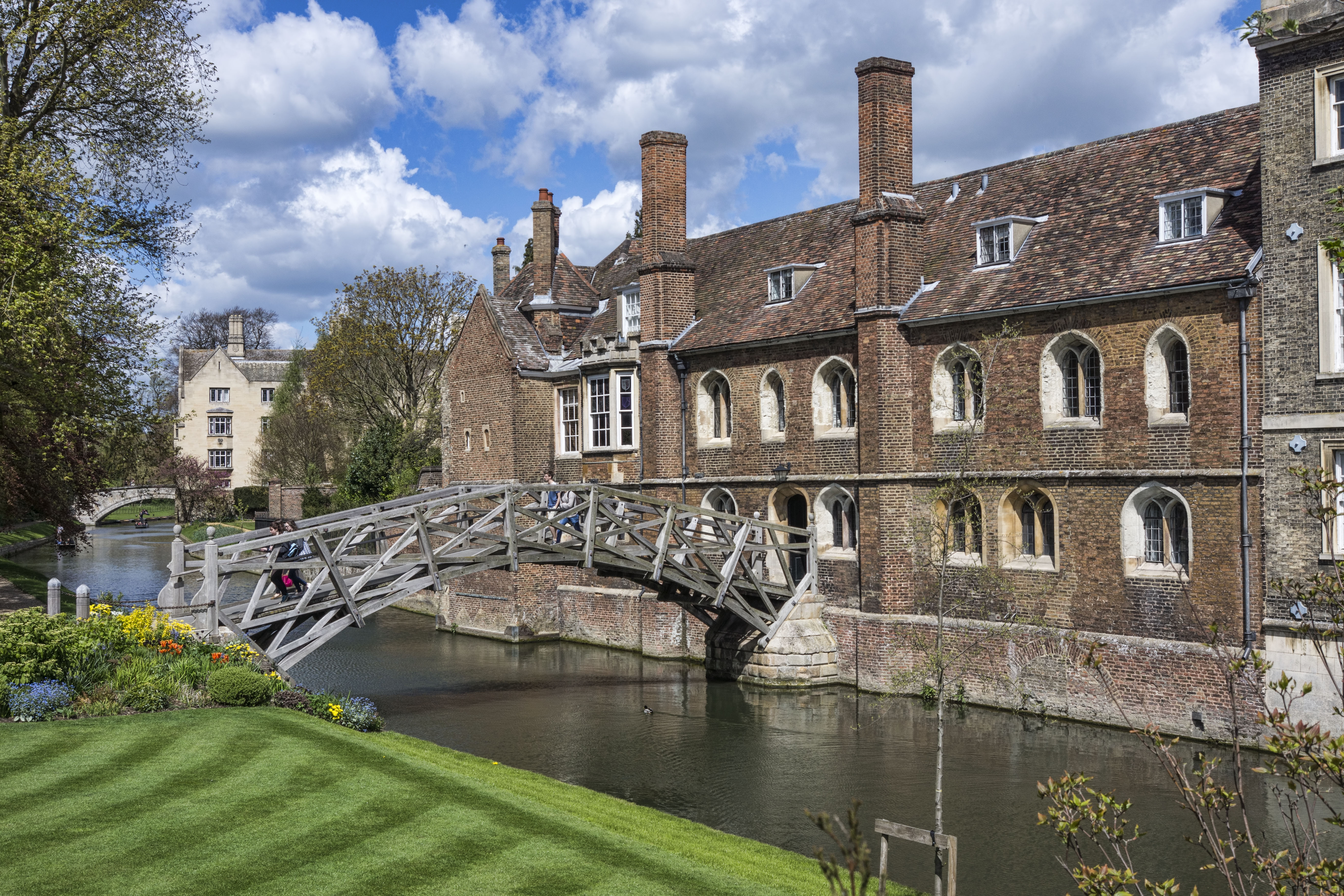 Mathematical Bridge Queen's College à Cambridge